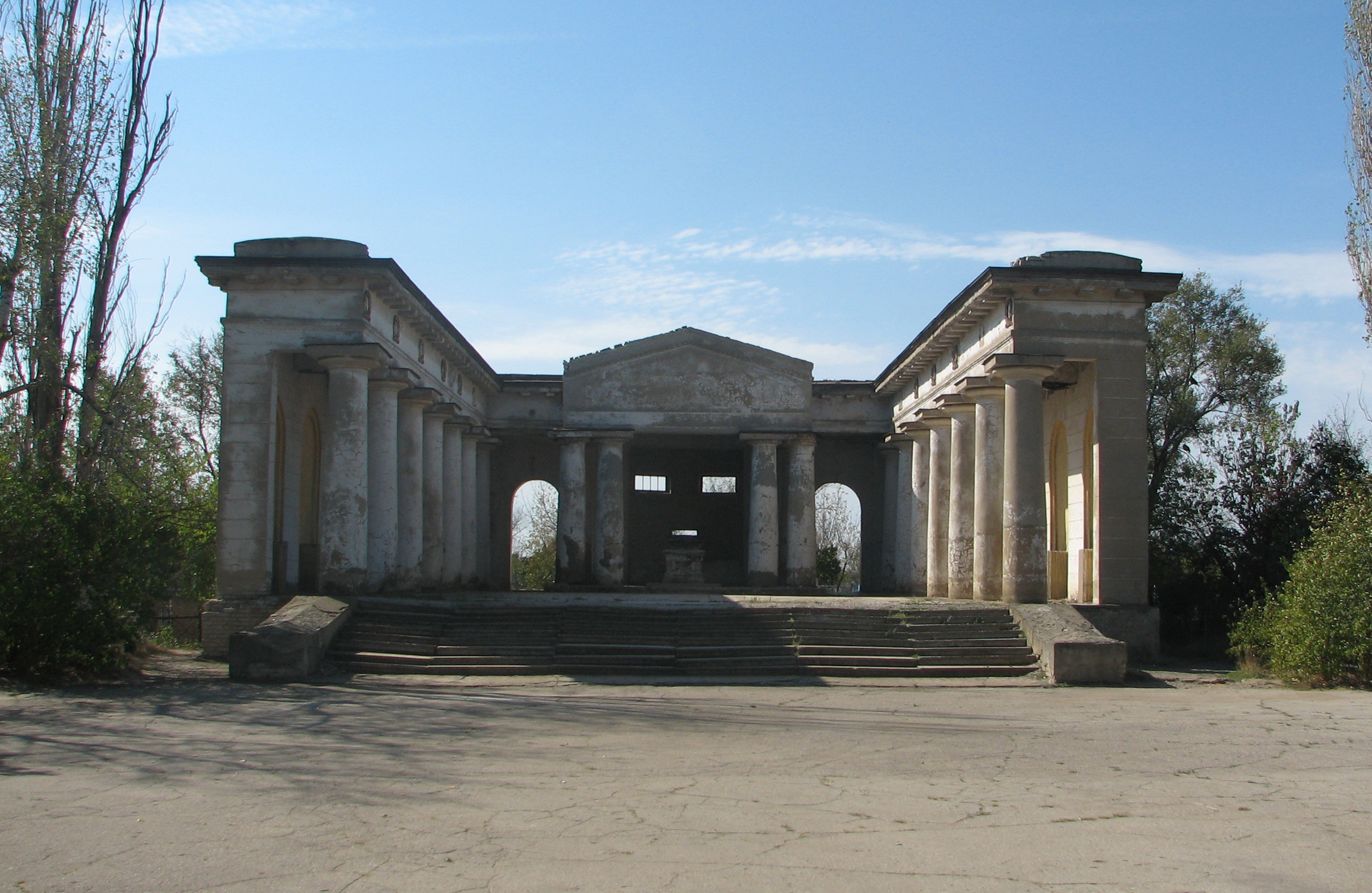 Старое кладбище в Волжском